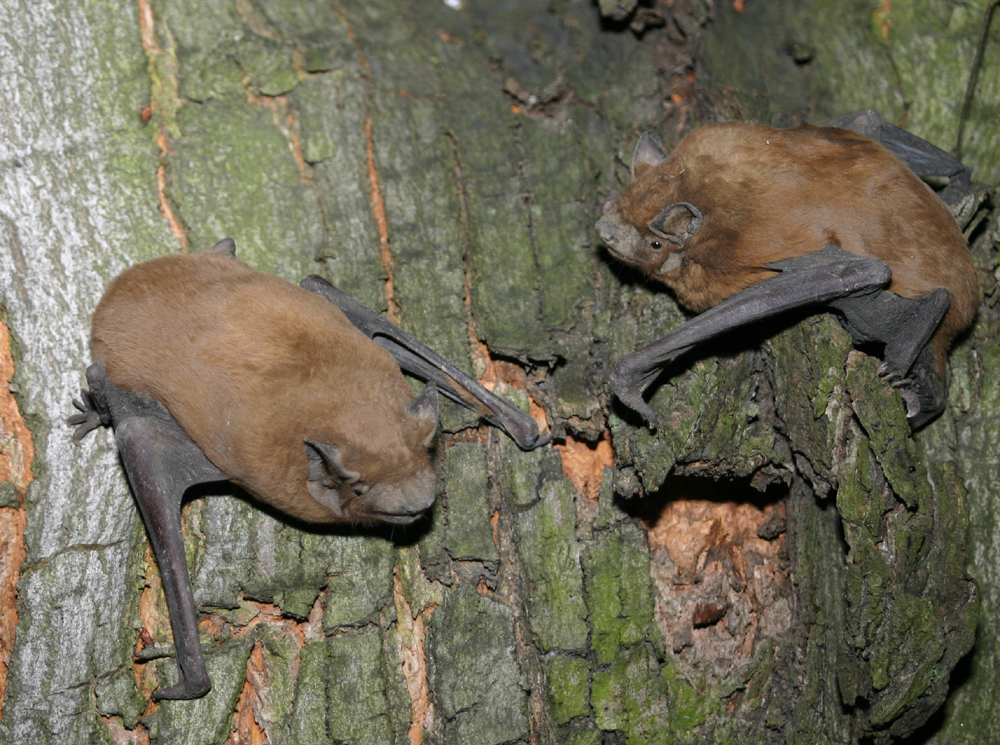 Rőt koraidenevérek (Kecskemét)